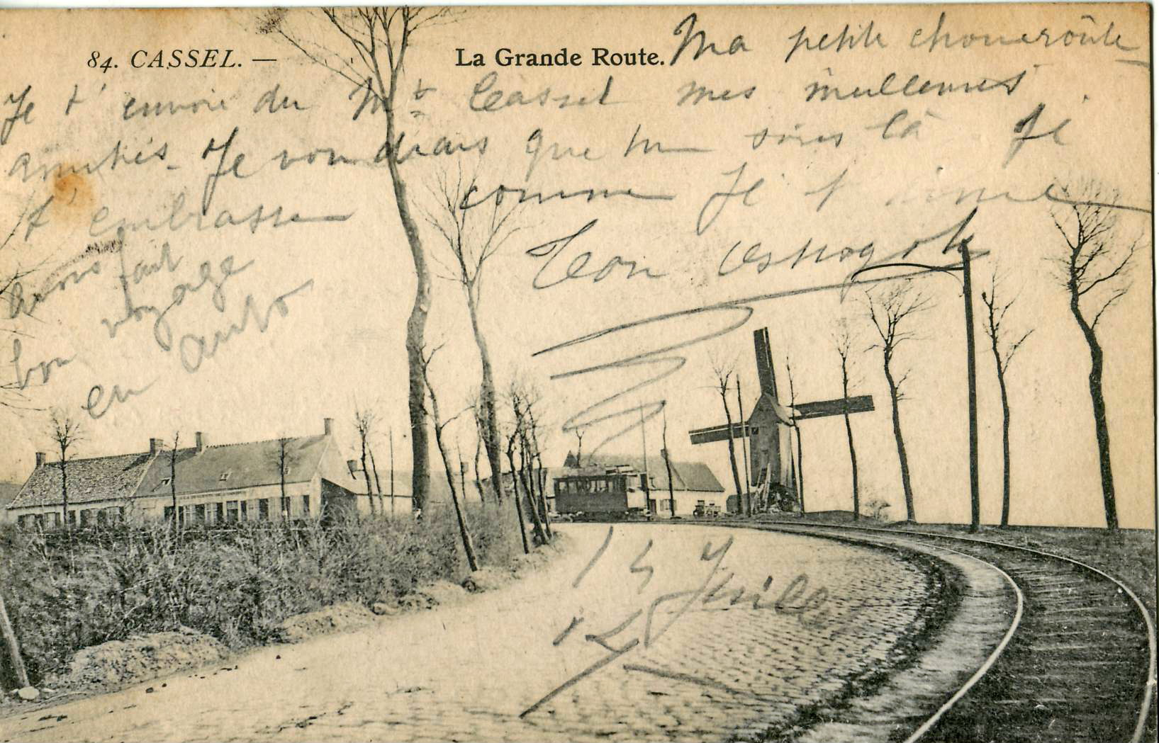 Carte postale ancienne, sans mention d'éditeur, n°84 : CASSEL - La Grande Route